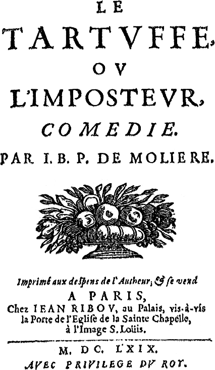 Front page of Le Tartuffe, ou l'Imposteur by Molière (1622-1673)